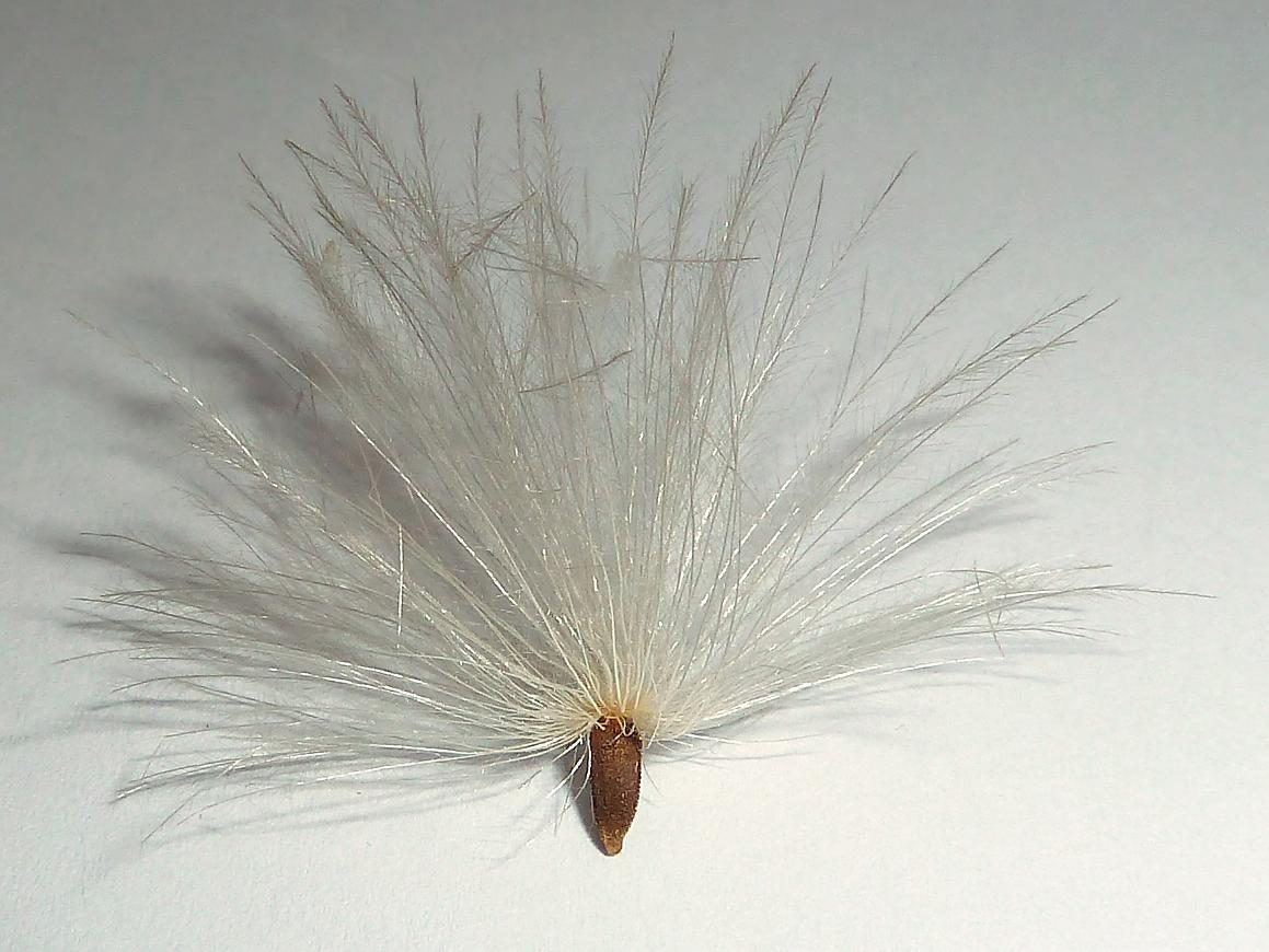 Rhaponticum coniferum (Cuchara de Pastor): Cipsela tuberculada con vilano de largos pelos sedosos plumosos. - Procedencia: Sierra de Degollados/Altamira (Cuenca, España), 25-07-1981.